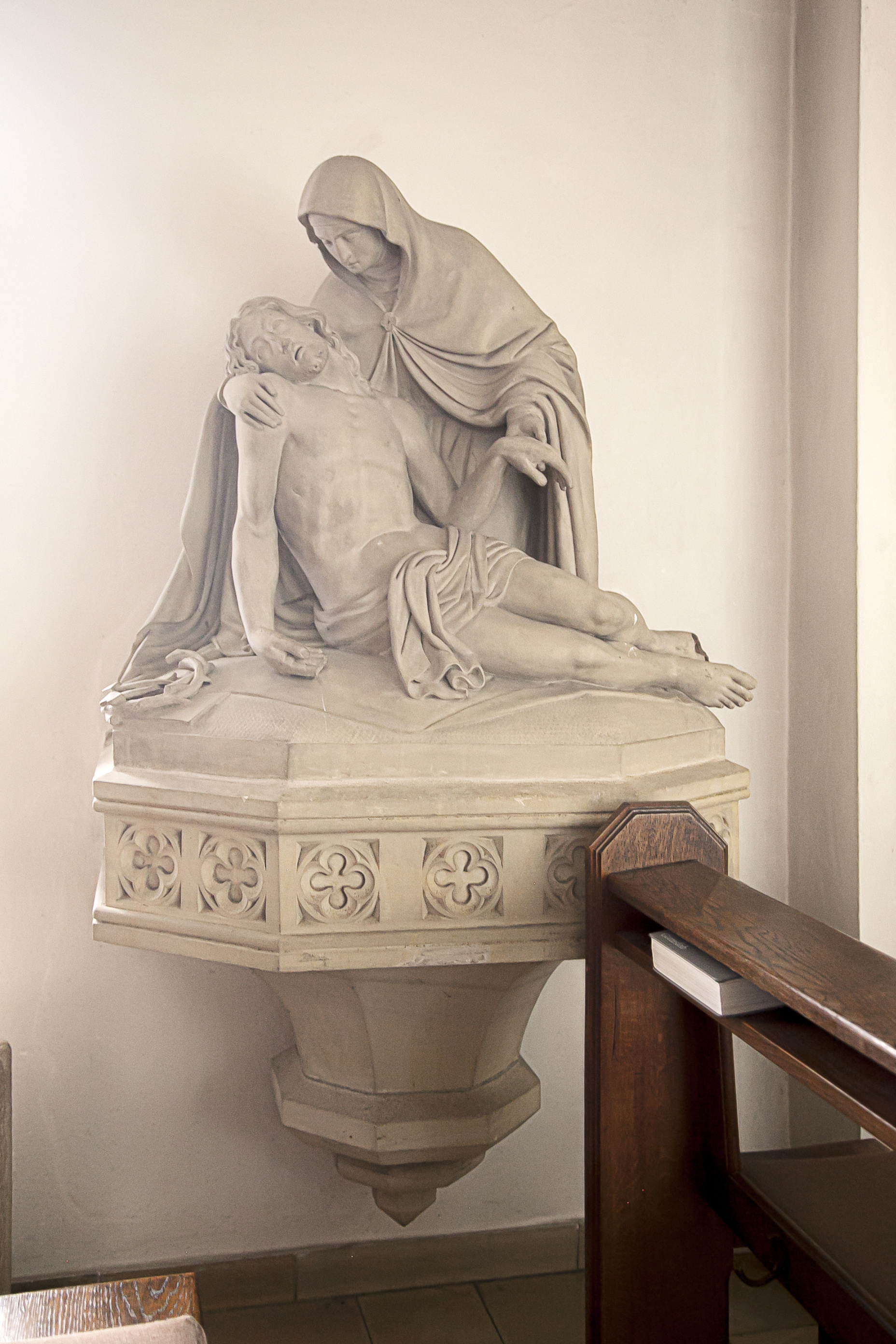 Elte, St. Ludgerus, Pieta